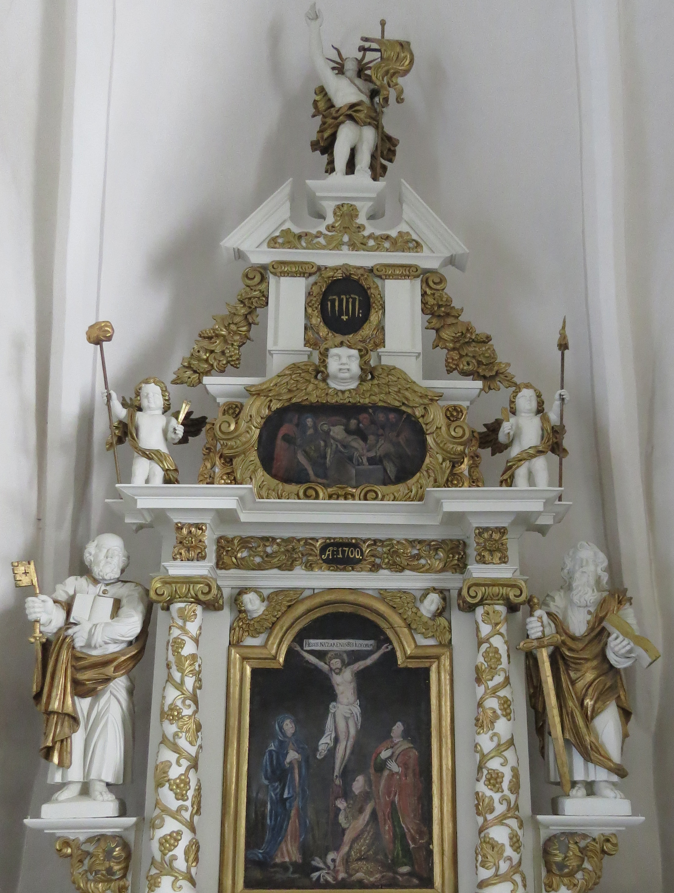 Altaruppsats i Skå kyrka, Ekerö